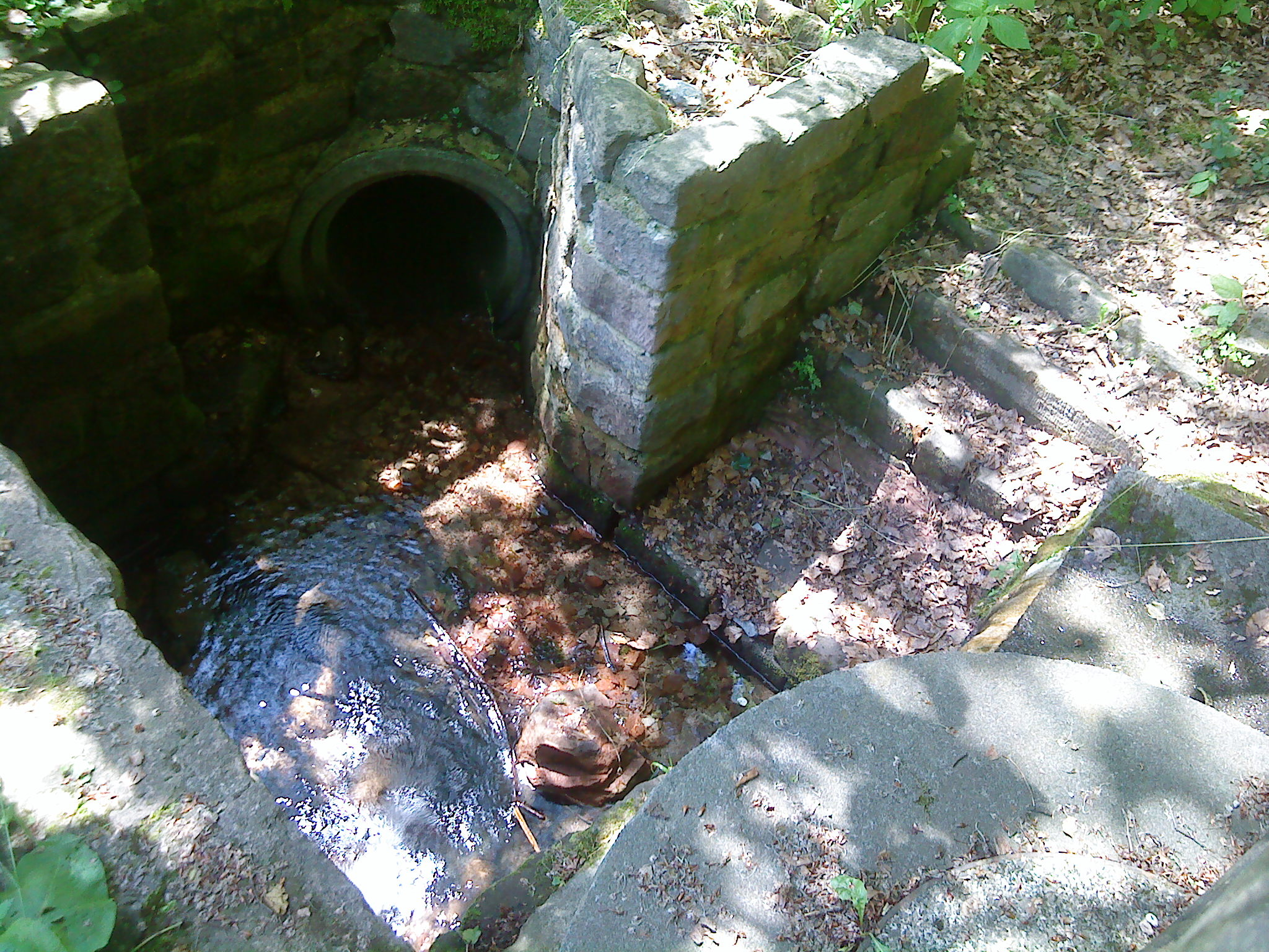 Der Autenborn oberhalb von Waldaschaff